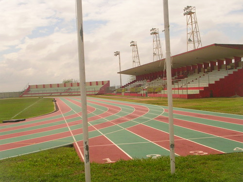 estadio